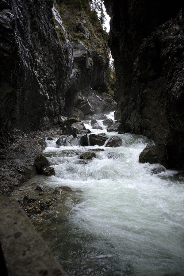 Le Partnachklamm.